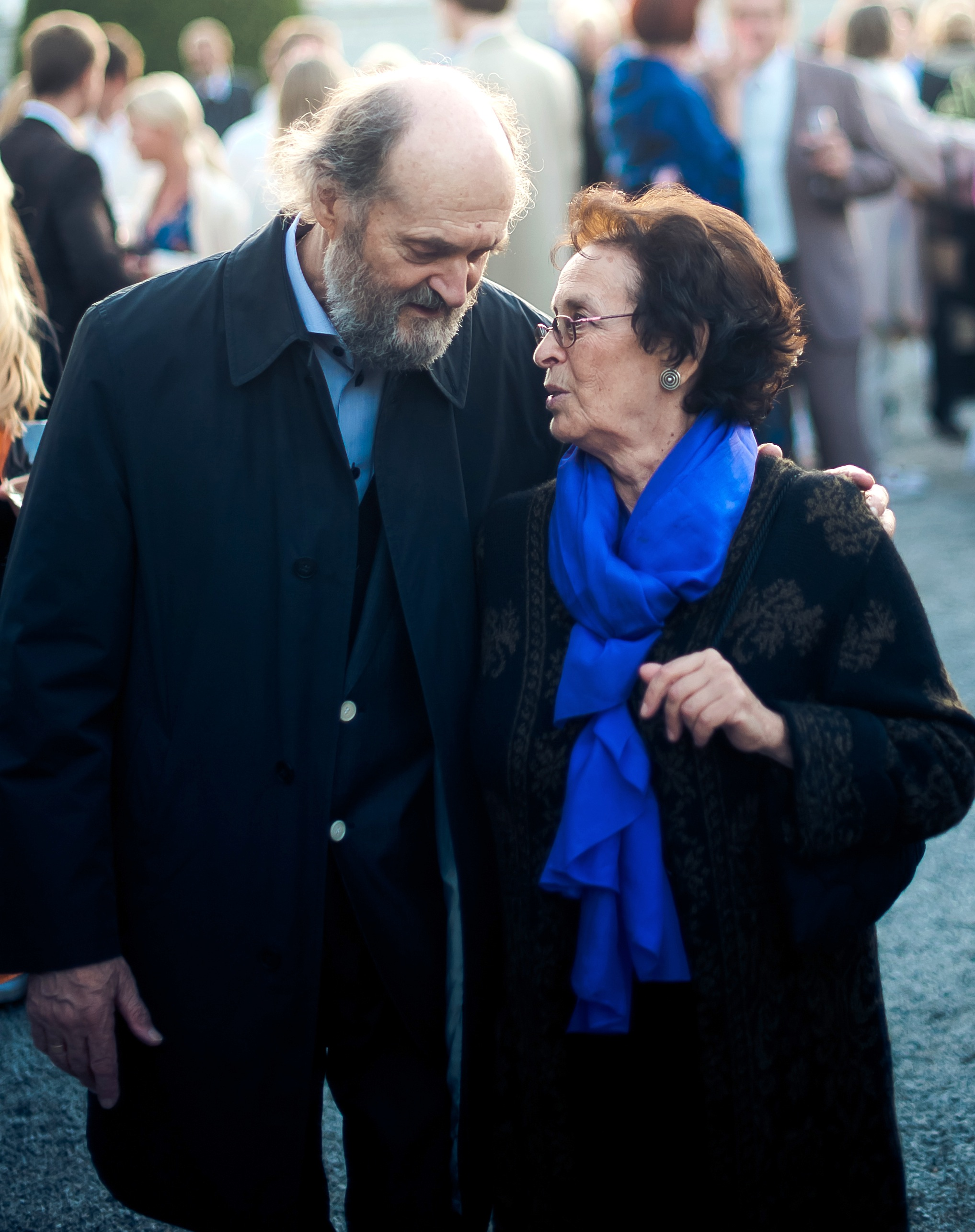 Arvo Pärt ja Nora Pärt Eesti riikliku iseseisvuse taastamise aastapäeva vastuvõtul augustis 2012.